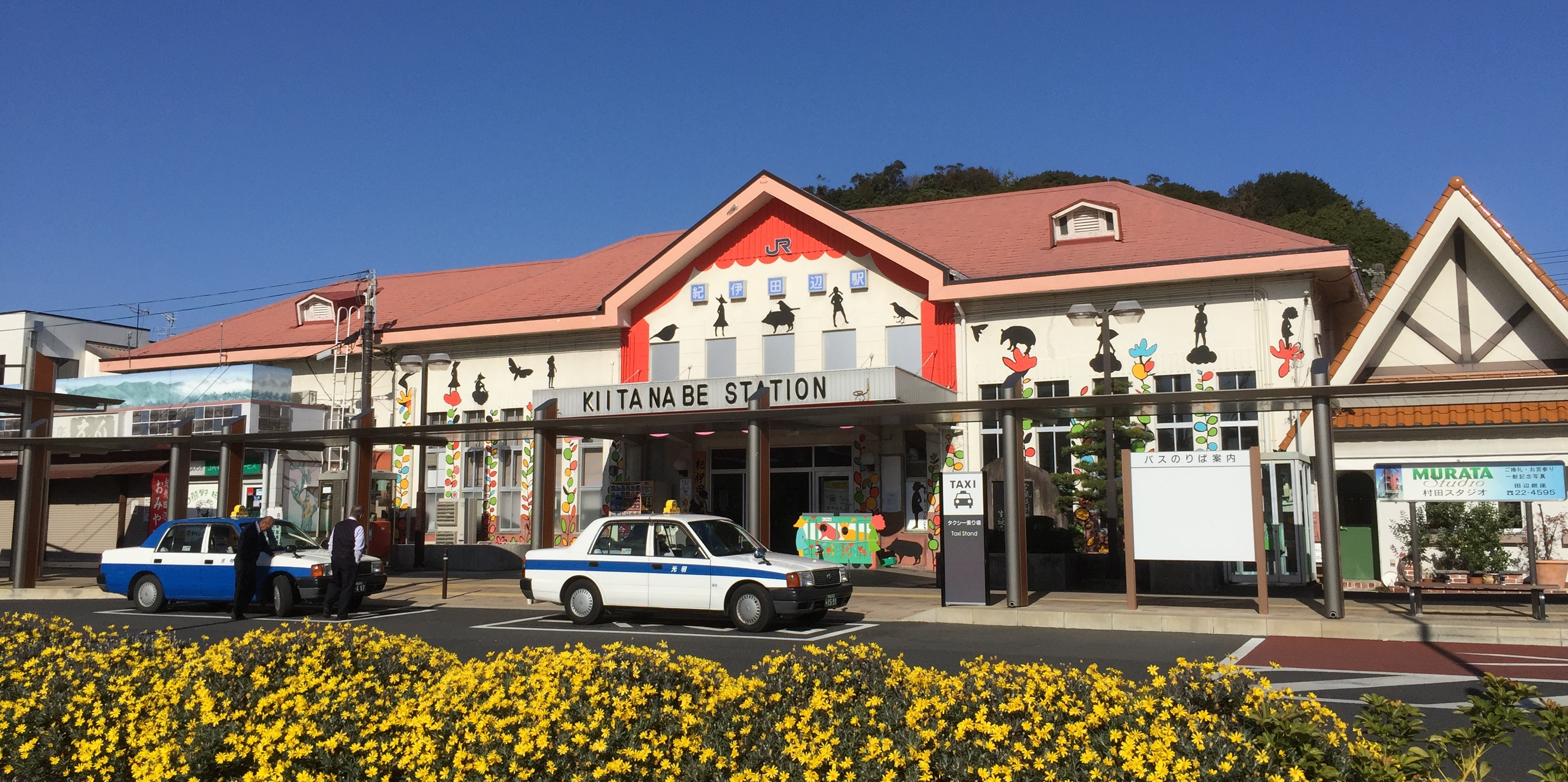 紀伊田辺駅駅舎